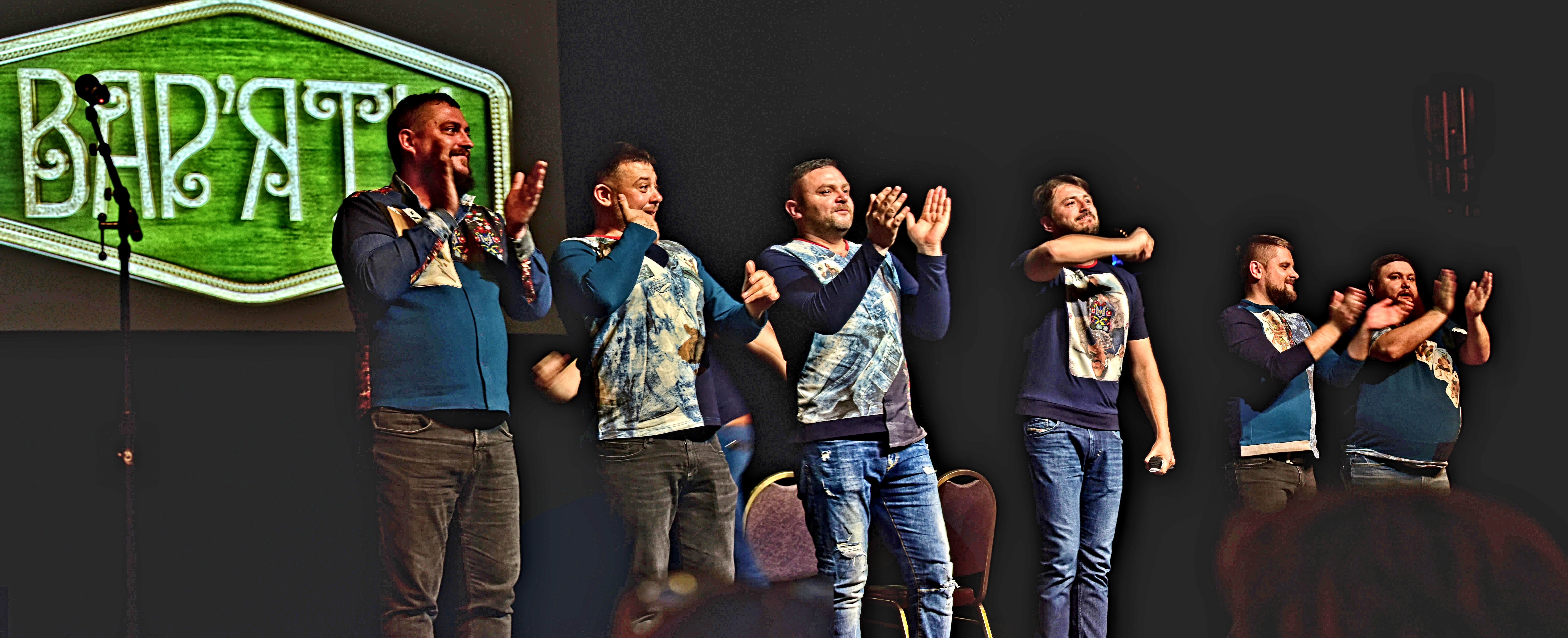 Виступ Сергія Притули та гумористичної групи "Вар'яти-шоу" в Театрі Квін-Елізабет у Торонто, листопад 2017 Сергей Притула